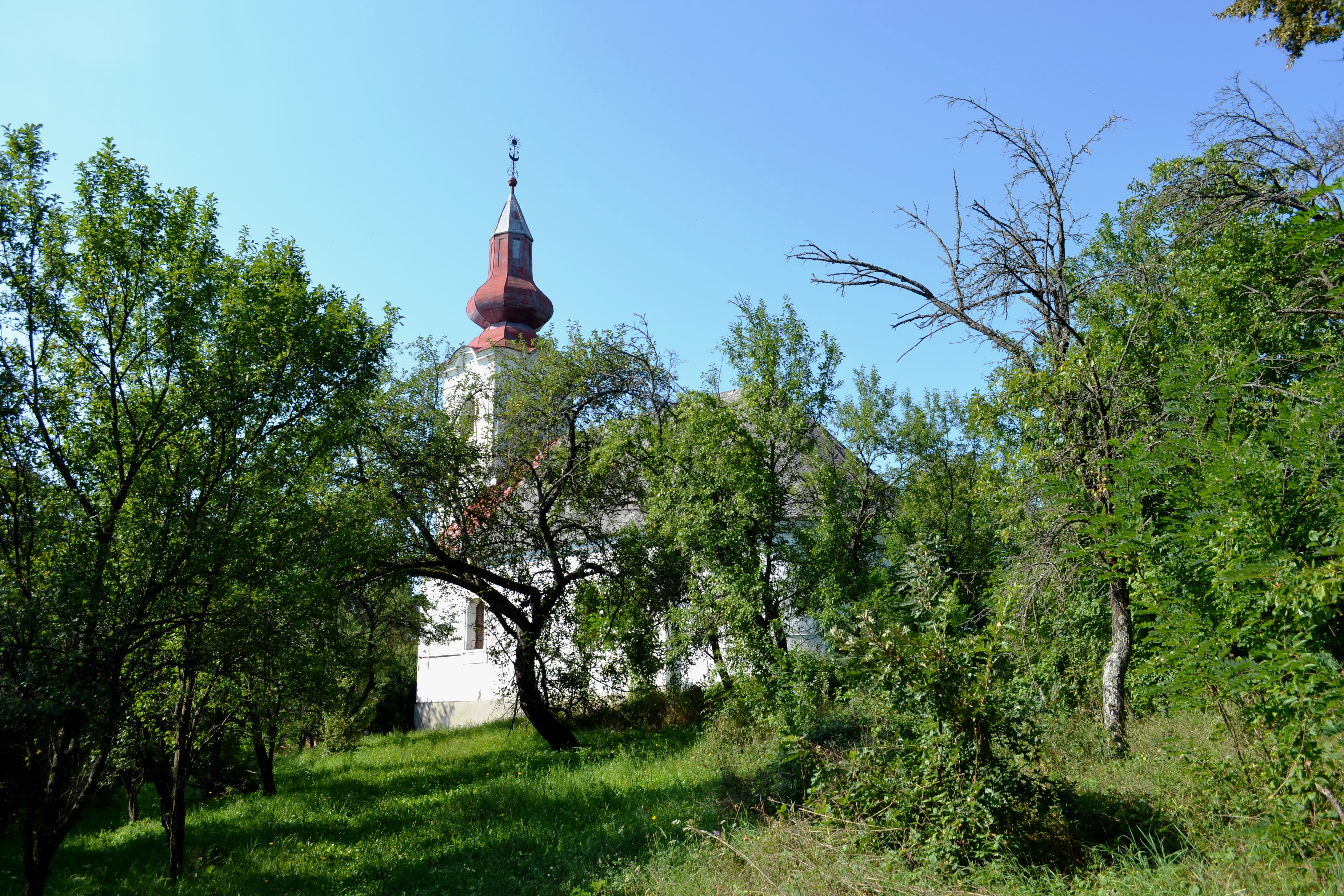 Budikovany, evanjelický klasicistický kostol z roku 1804